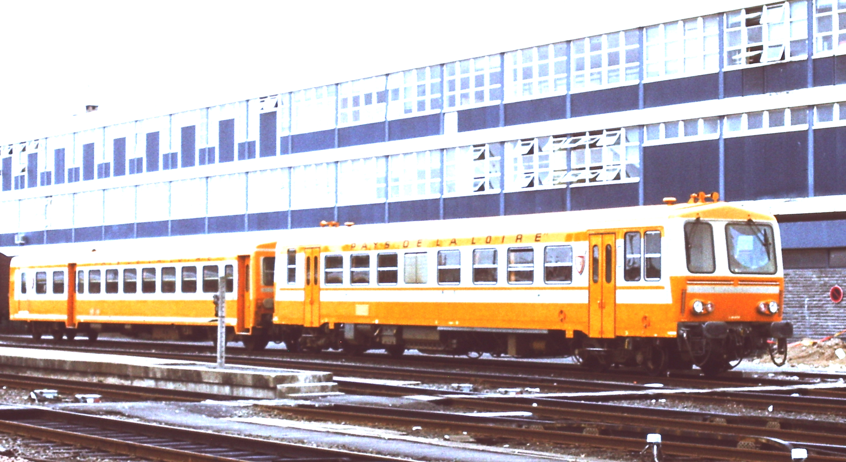 Pays de la Loire motorrijtuig van het type AB X 2100 en rijtuig van het type ABD XR 69002 te Nantes.